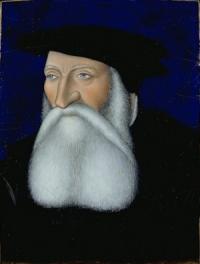 Portrait de Galiot de Genouillac